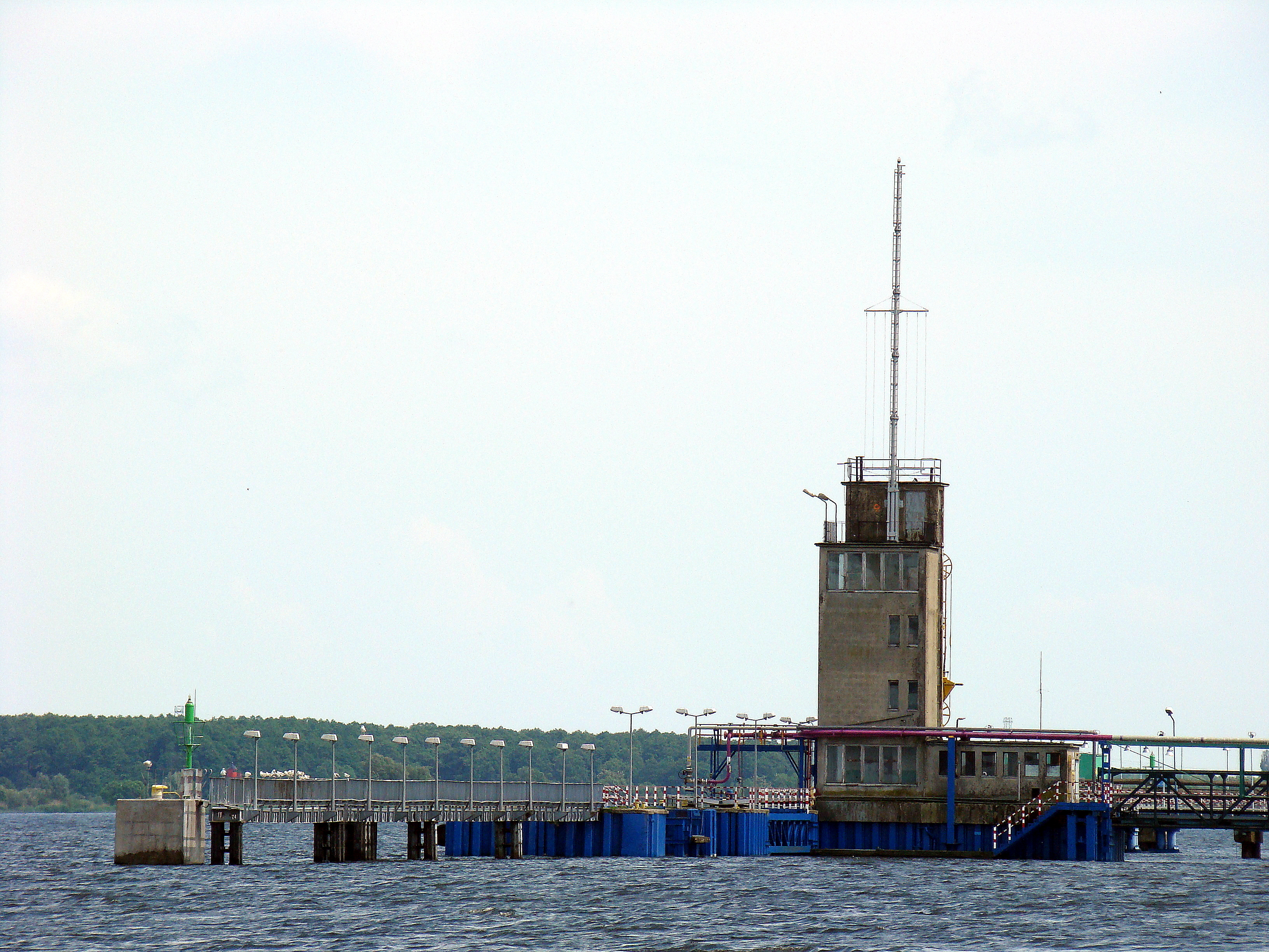 Port Police, (Stanowisko przeładunkowe Mijanka), Województwo zachodniopomorskie, Polska